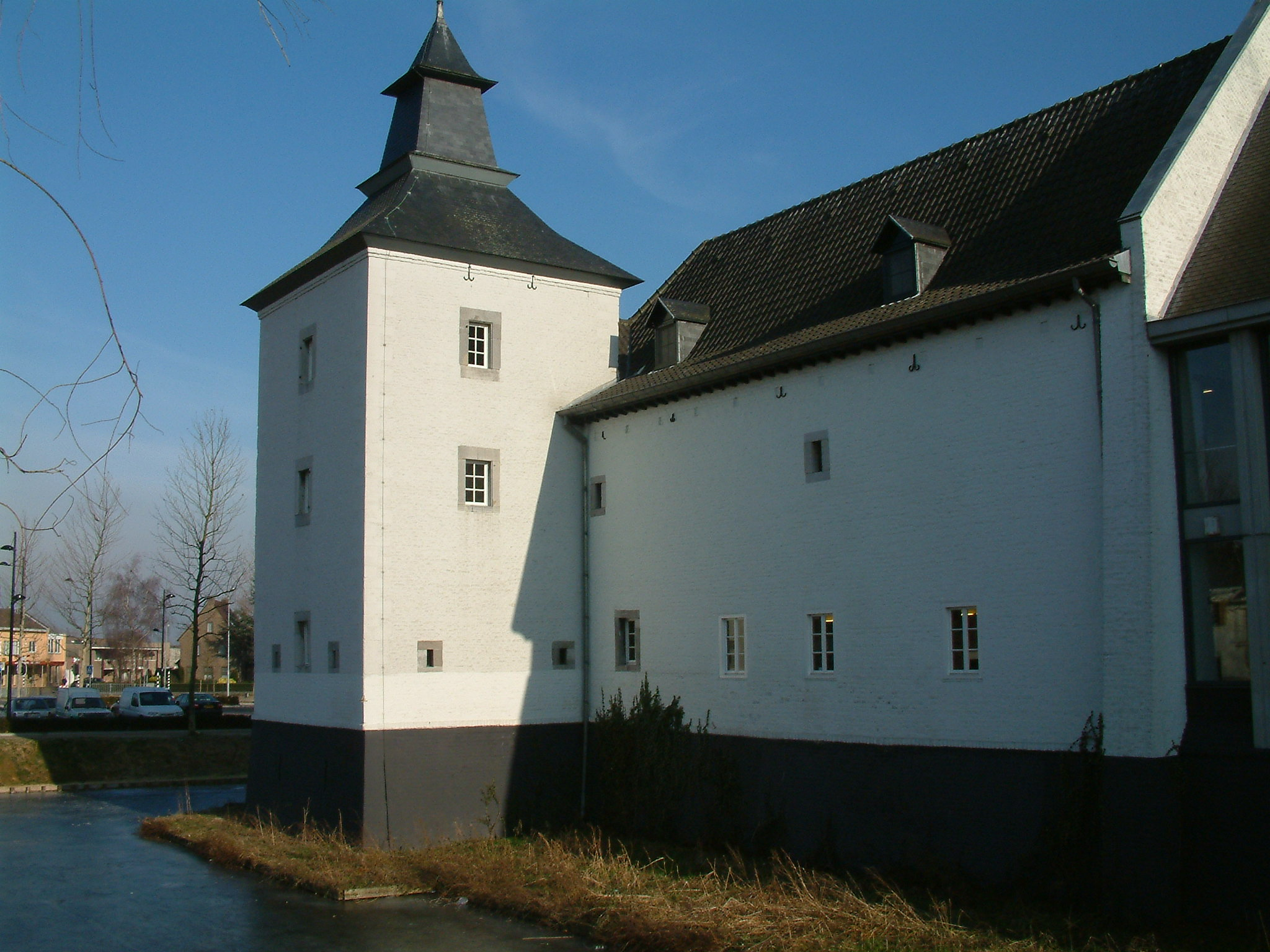 Kasteel Born, voorburcht, kasteelboerderij